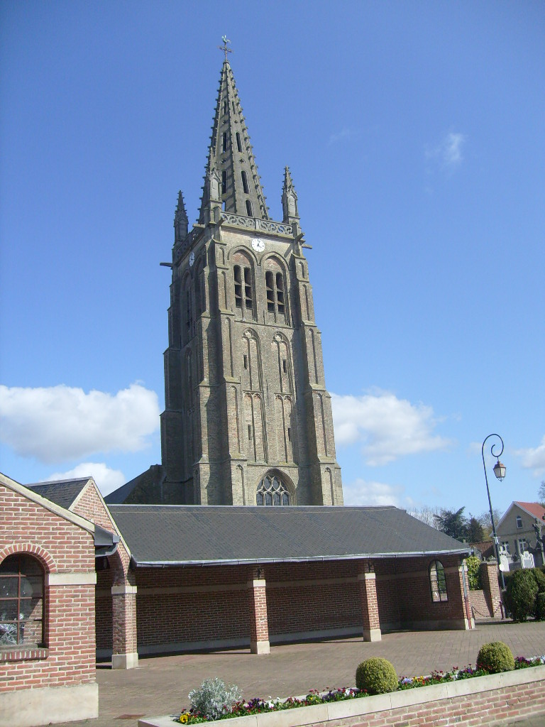 Eglise de Socx